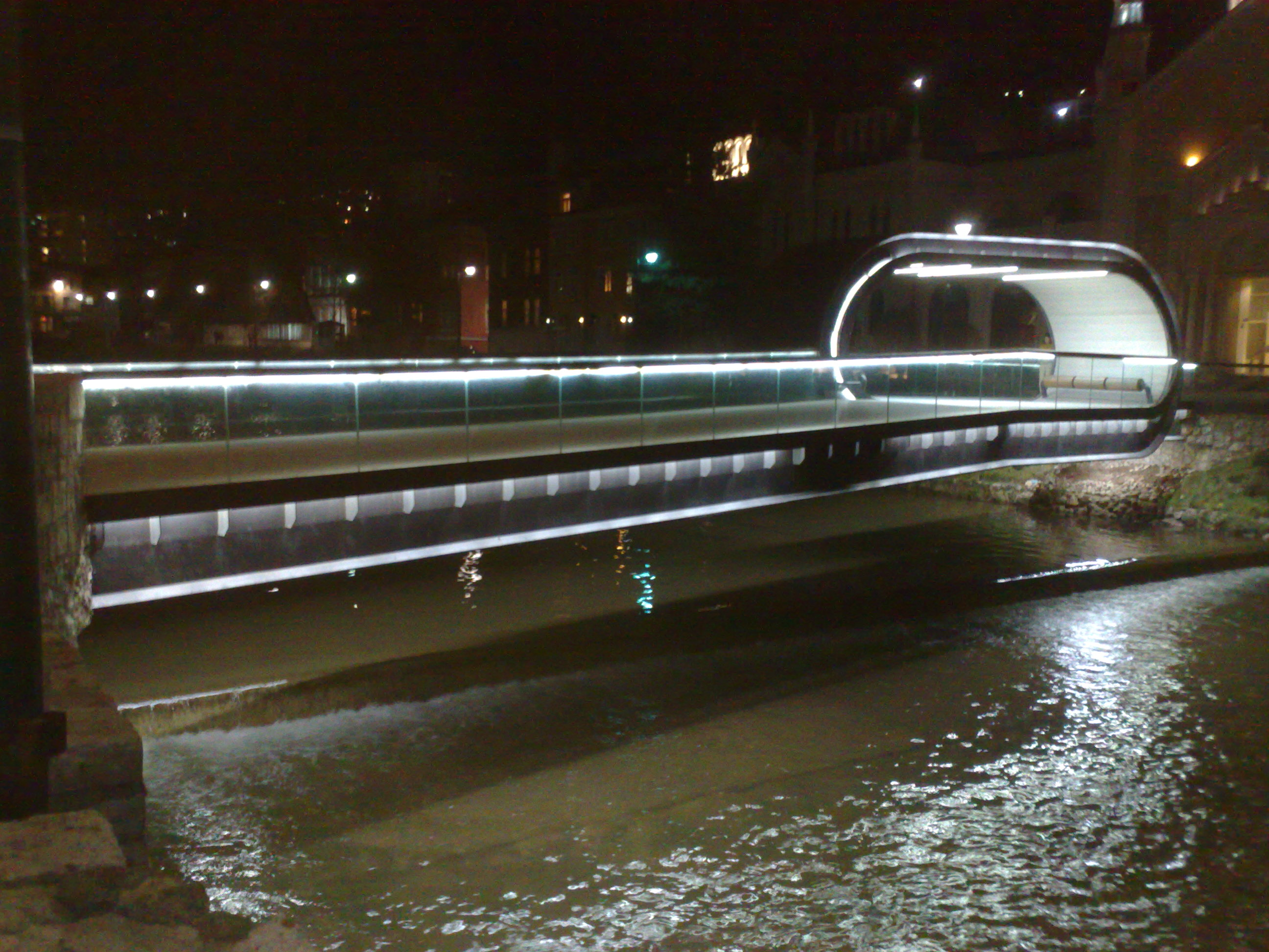 Ovo je slika mosta Festina lente u Sarajevu.